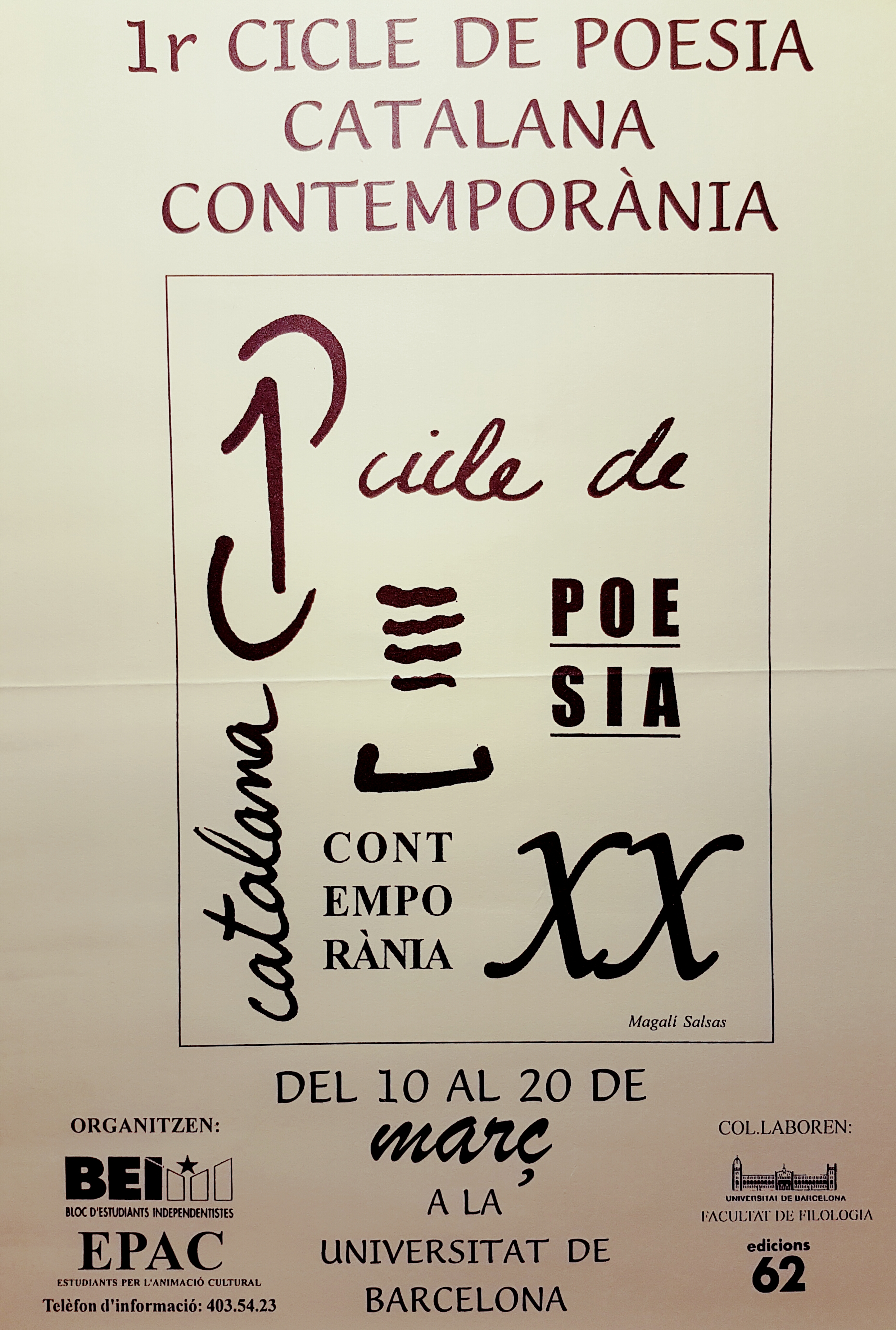 Cartell del 1r Cicle de Poesia Catalana Contemporània a la UB. Març de 1997